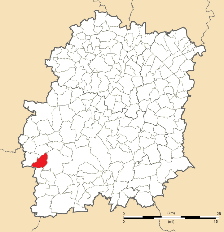 Carte de position de Mérobert en Essonne (91)